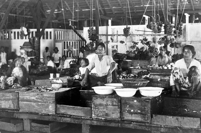 Repronegatief. De oude markt te Banjarmasin, Zuidoost-Borneo